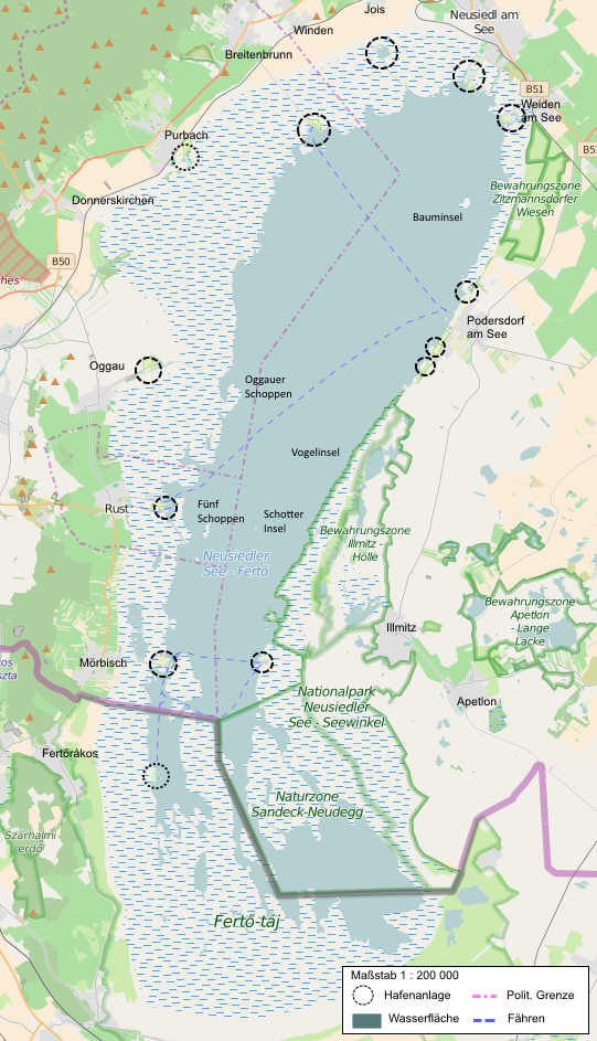 OpenStreemap Export mit eigener Bearbeitung des Neusiedlersees unter besonderer Berücksichtigung der Inseln, der Hafenanlagen und der Fährstraßen